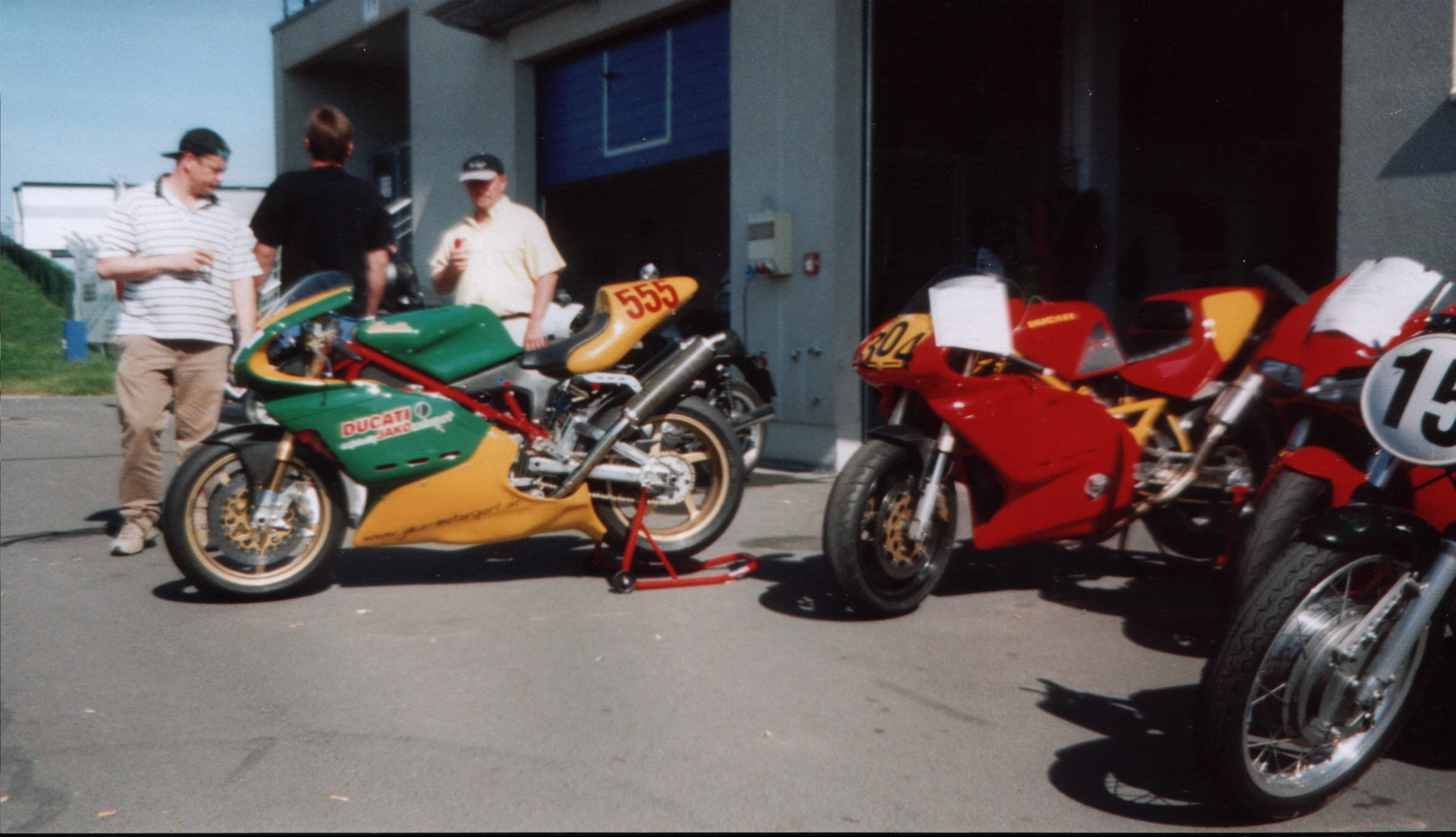 Ducati Supermono auf dem Festival Italia in Oschersleben.